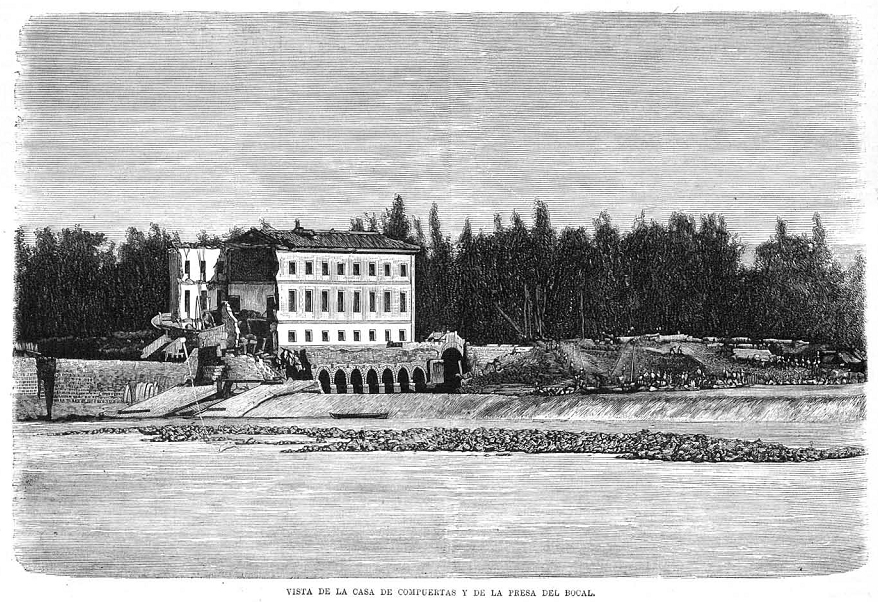 Canal Imperial de Aragón, vista de la casa de compuertas y de la presa del Bocal, tras el hundimiento en agosto de 1874, en la revista española La Ilustración Española y Americana.